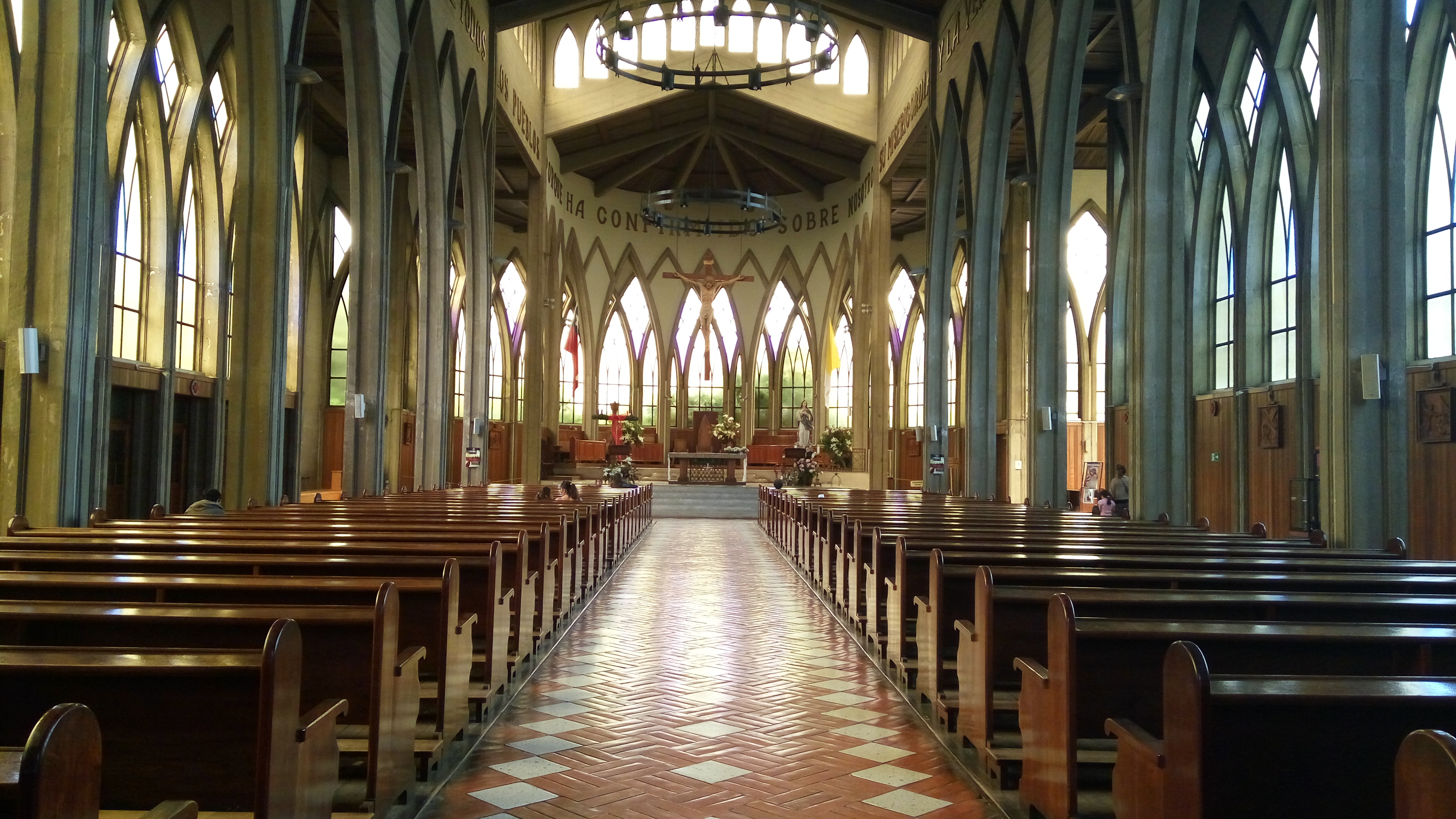 Interior catedral de Osorno